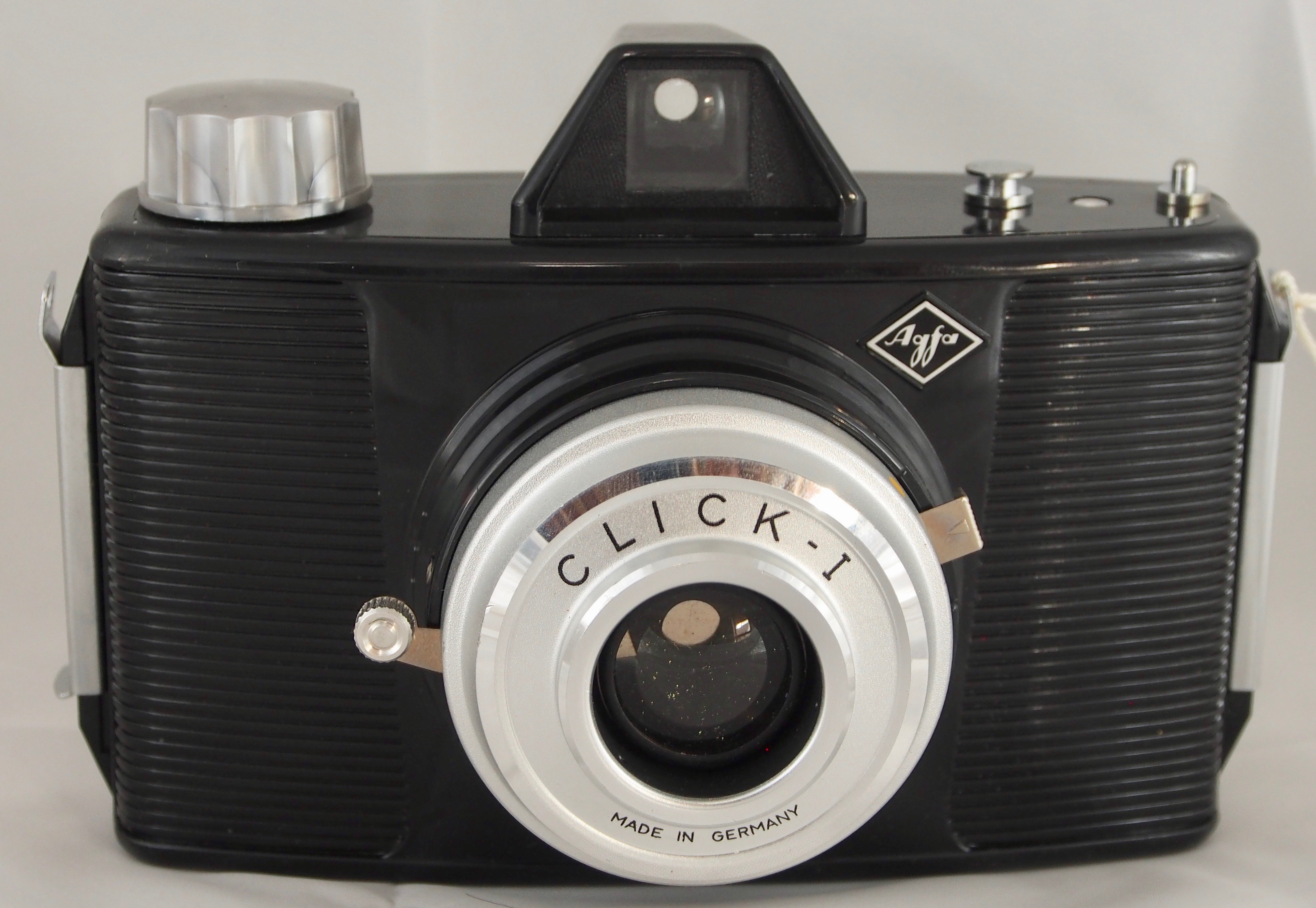 Click I Kadl# 1290